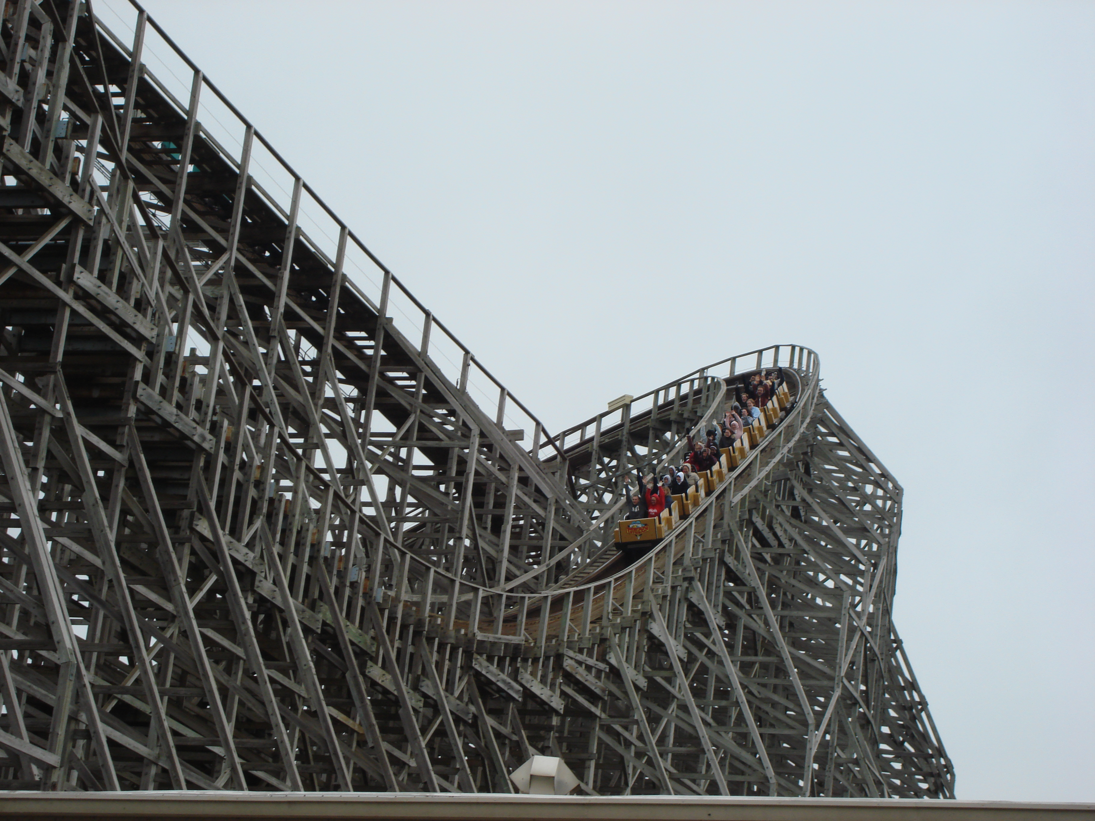 Mean Streak , montagnes russes à Cedar Point